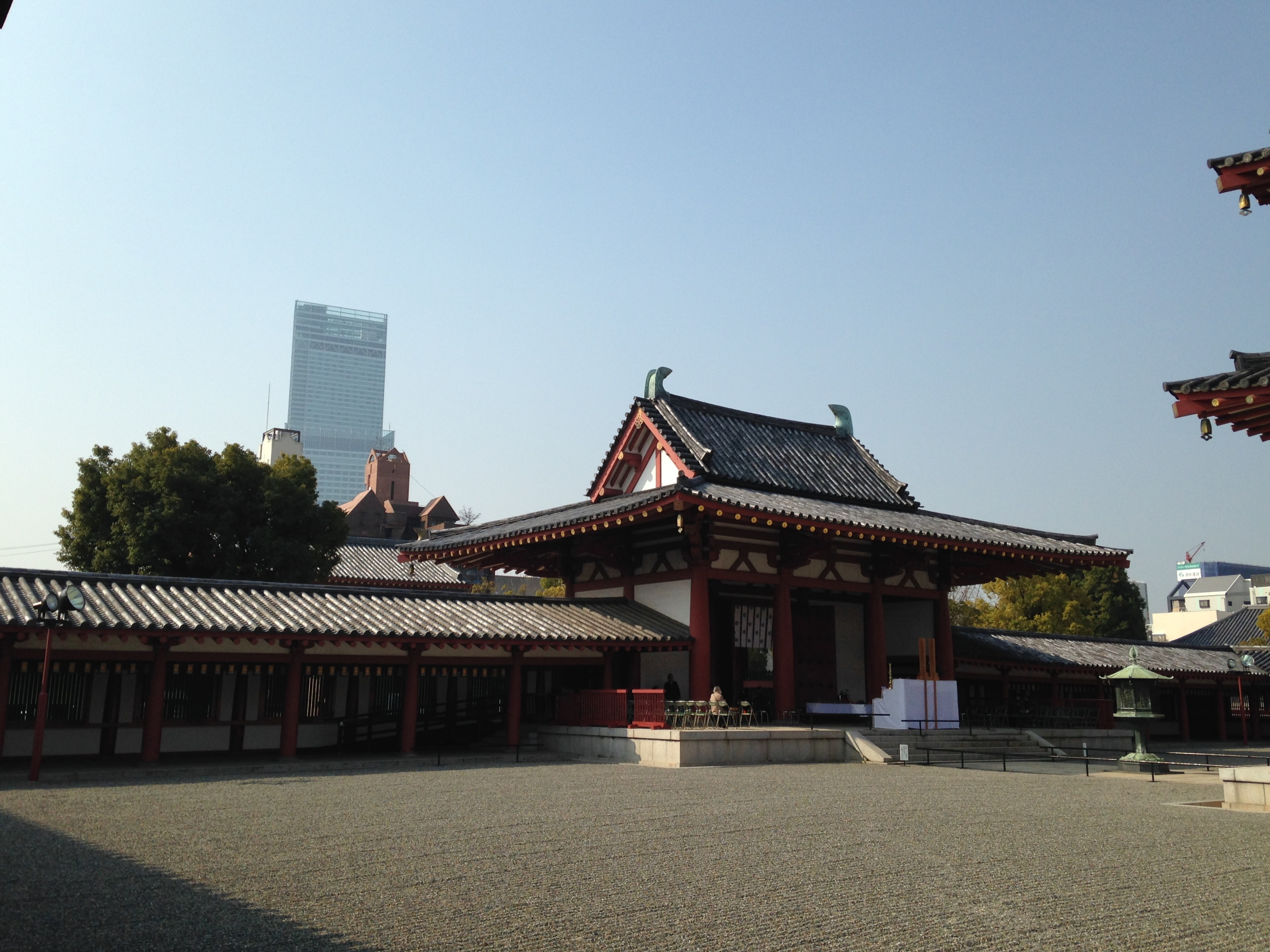 四天王寺の中門とあべのハルカス